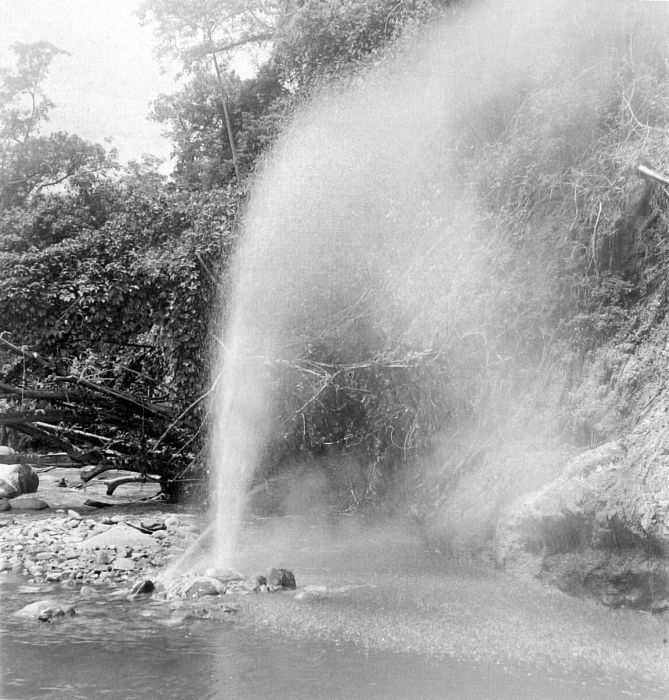 Negatief. Een spuitende geijser ten westen van Tjisolok aan de Wijnkoopsbaai, West-Java